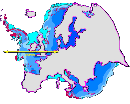 Size comparison Europe - Antarctica